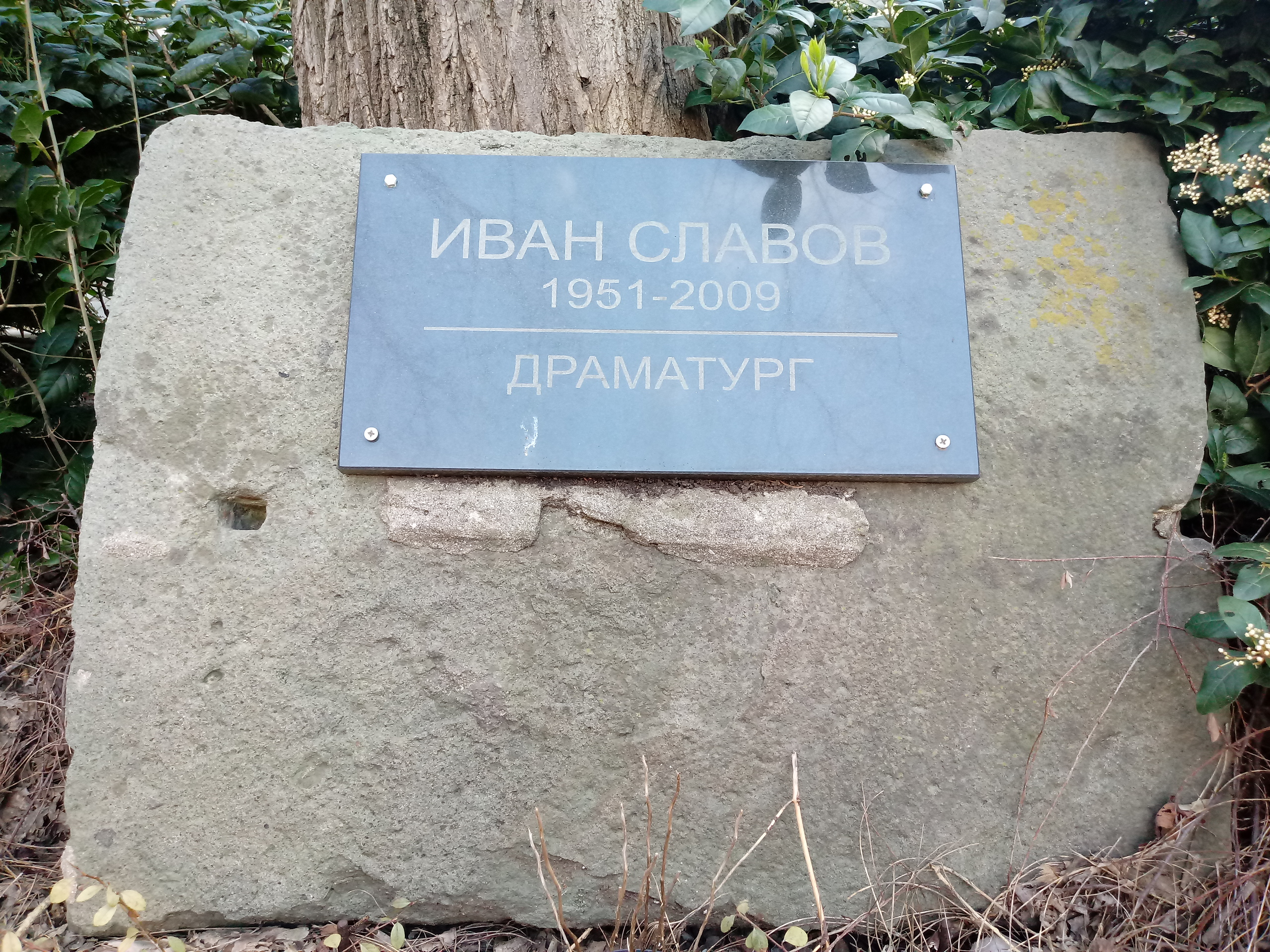 Ivan Slavov memorial plaque, Tsar Asen Str., Burgas